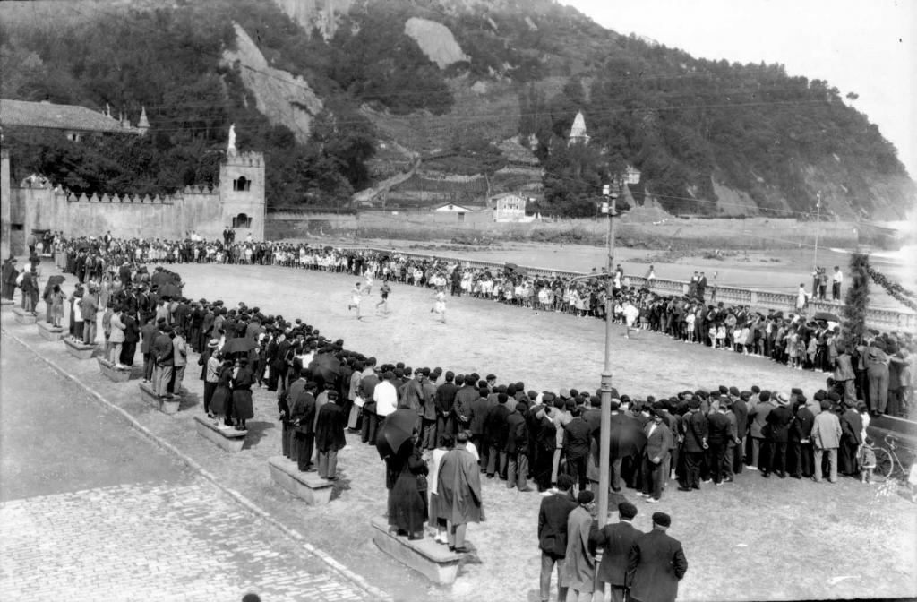 Lokotx biltzea Zarautzen.